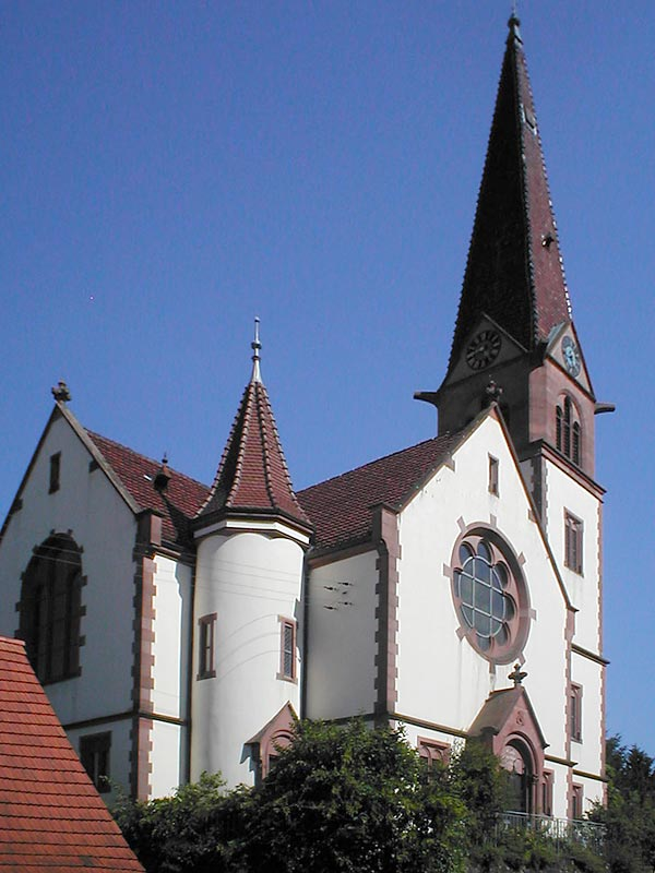 Evangelische Kirche in Gauangelloch, erbaut 1901